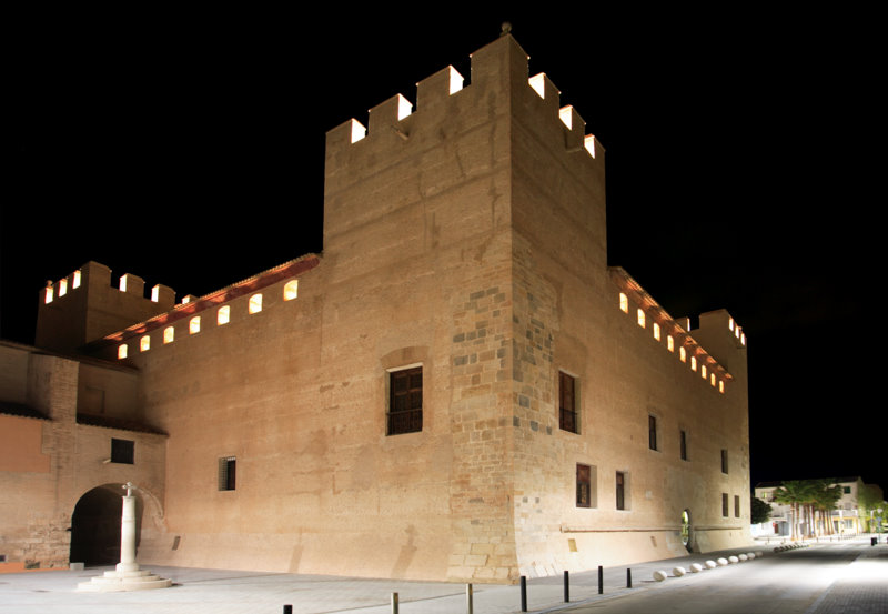 Exterior del Castell d'Alaquàs